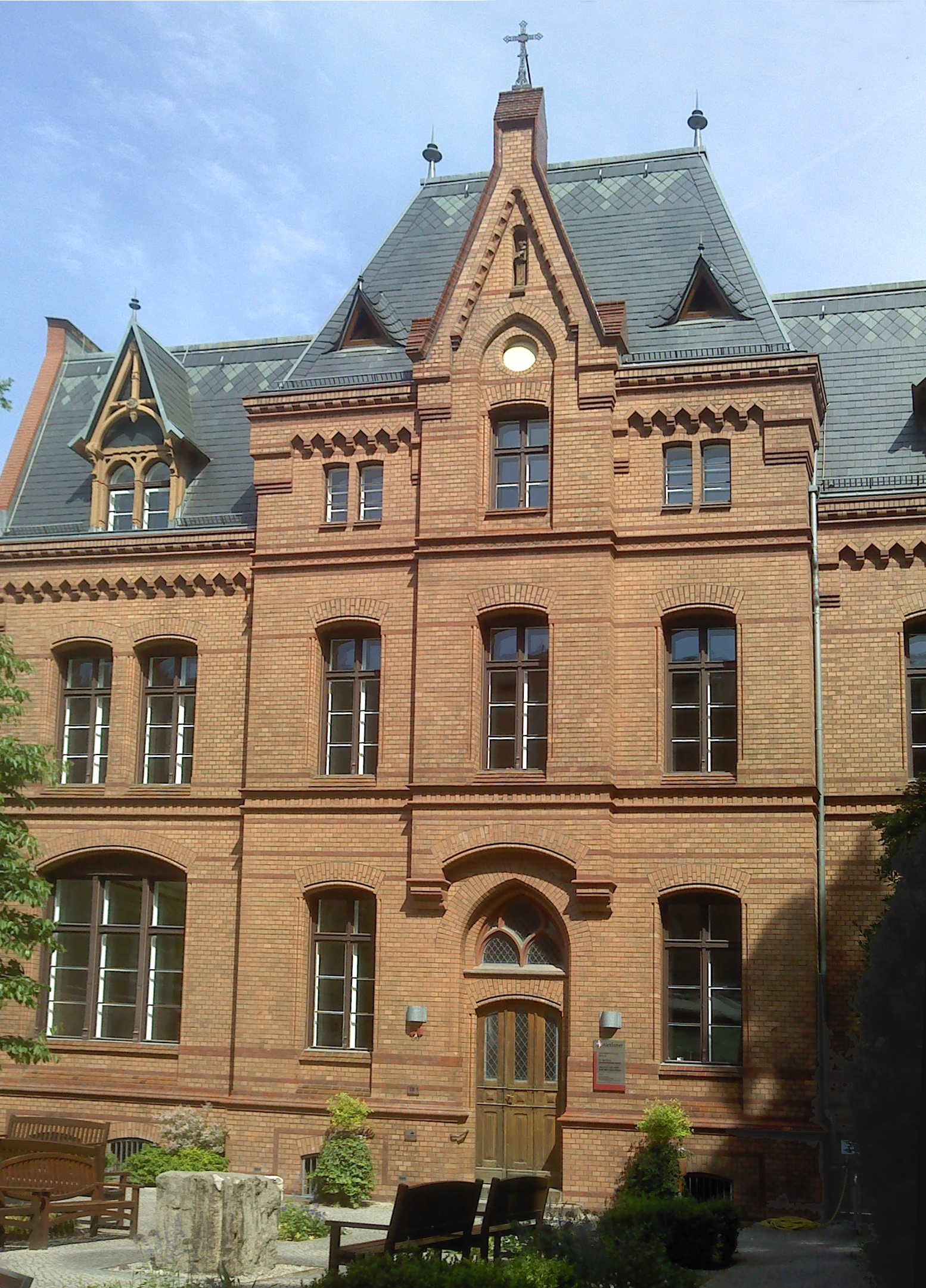 St. Hedwig-Krankenhaus: St. Michael-Stift